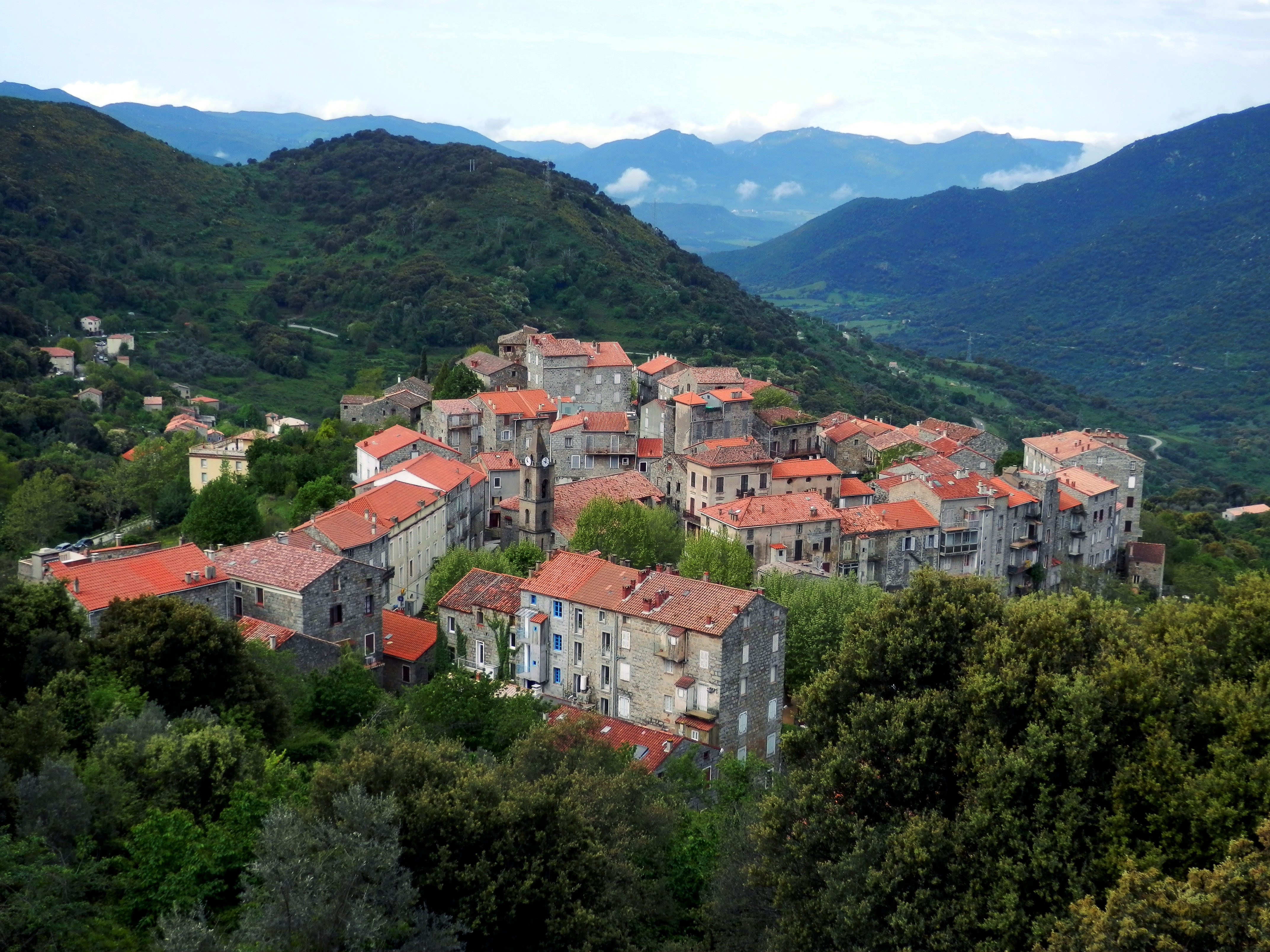 Corsu: U paesi di Santa Lucìa d'Attallà